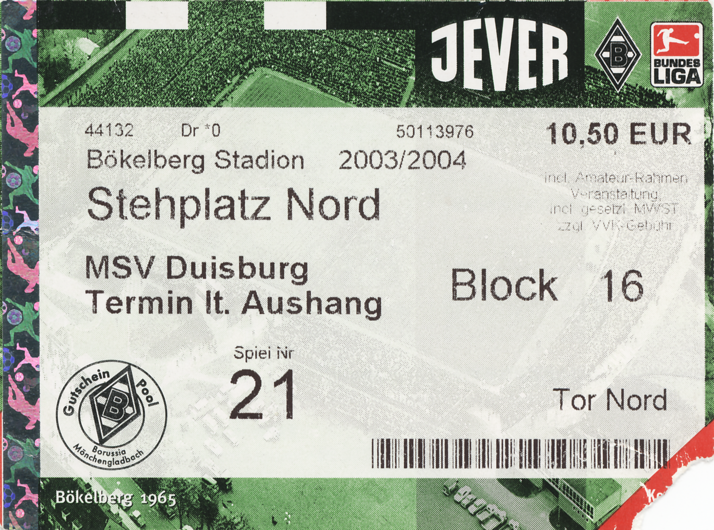 Eintrittskarte des Viertelfinalspiels im DFB-Pokal vom 3. Februar 2004